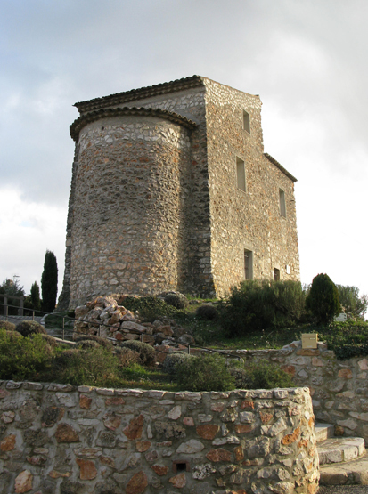 Ancienne chapelle Saint-Esprit à Montmeyan, Var, France.